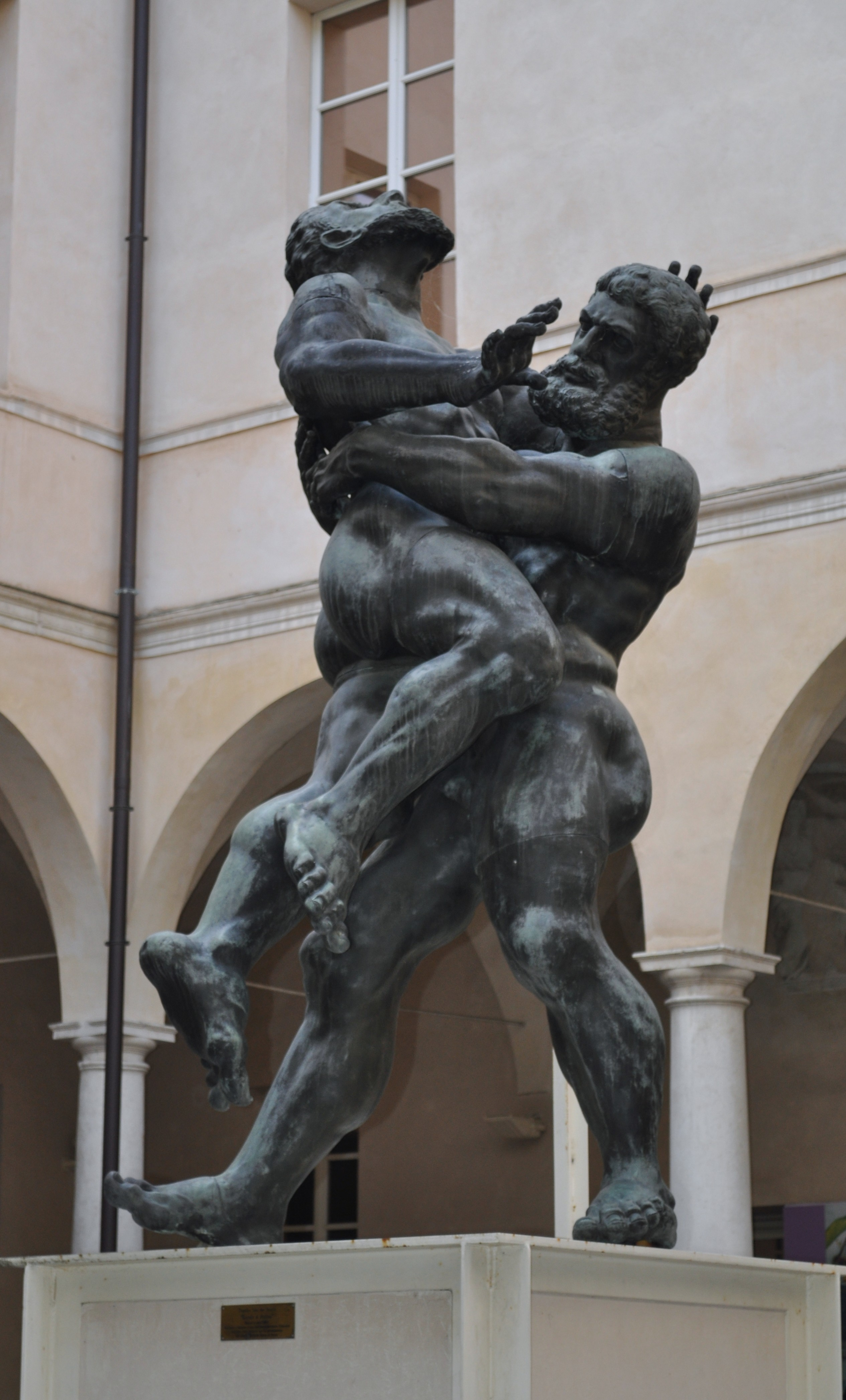 Monumento ad Ercole ed Anteo Il Monumento è opera dell'artista fiammingo Teodoro Vanderstruck e risale agli anni tra il 1684 e 1687. Pensato originariamente per ornare la vasca collocata davanti a Palazzo Ducale, in realtà venne più volte trasferito fino all'attuale collocazione all'interno della Casa della Musica. Una copia della statua e posta a ridosso della facciata posteriore del Municipio . Il Monumento originale è realizzato in rame ed è noto anche con il nome dialettale parmigiano " I du Brasè". Rappresenta l'unico statua rimasta tra quelle che si trovavano all'interno del Giardino Ducale dei Farnese